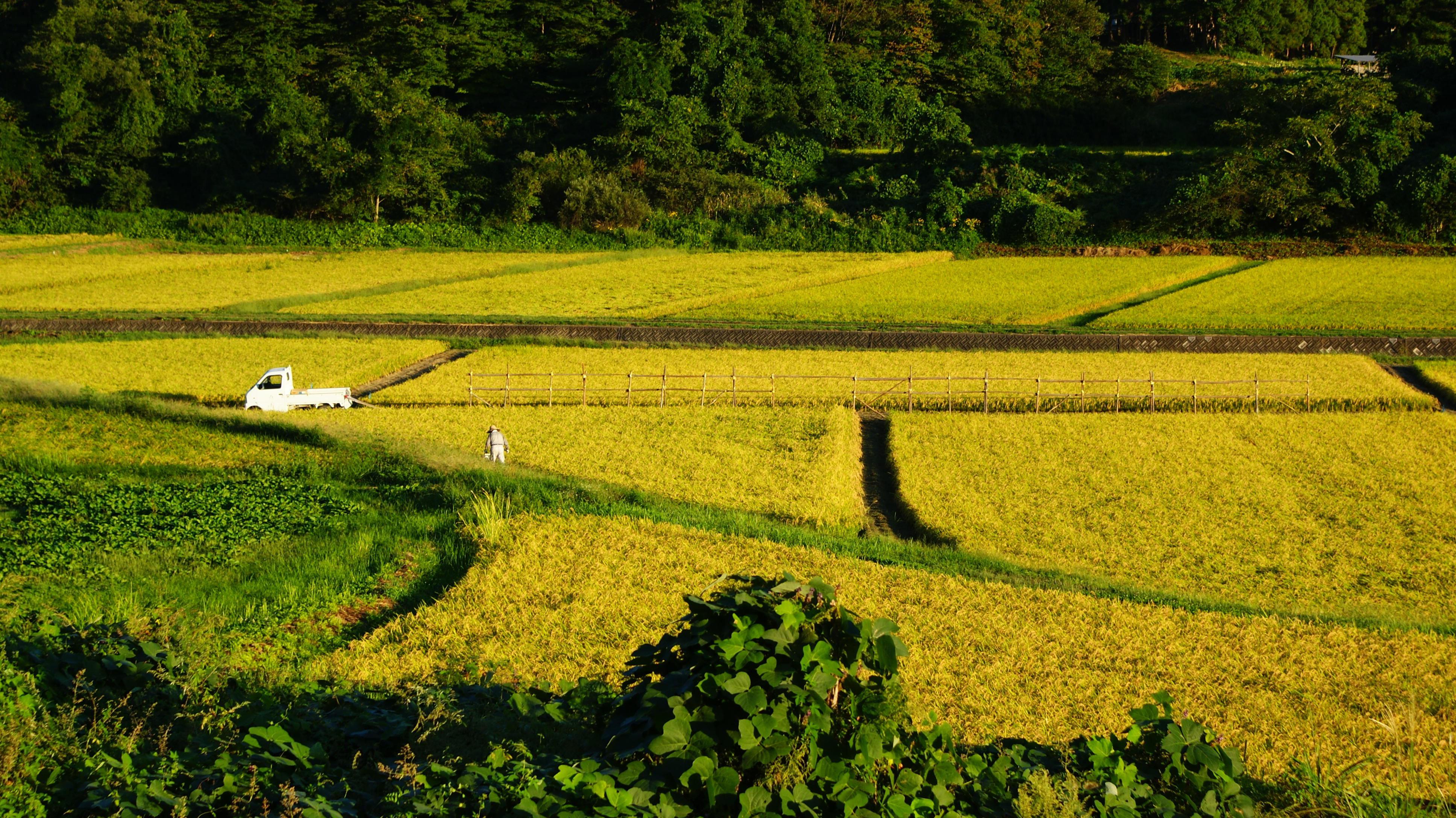 稲刈りの準備、花巻市